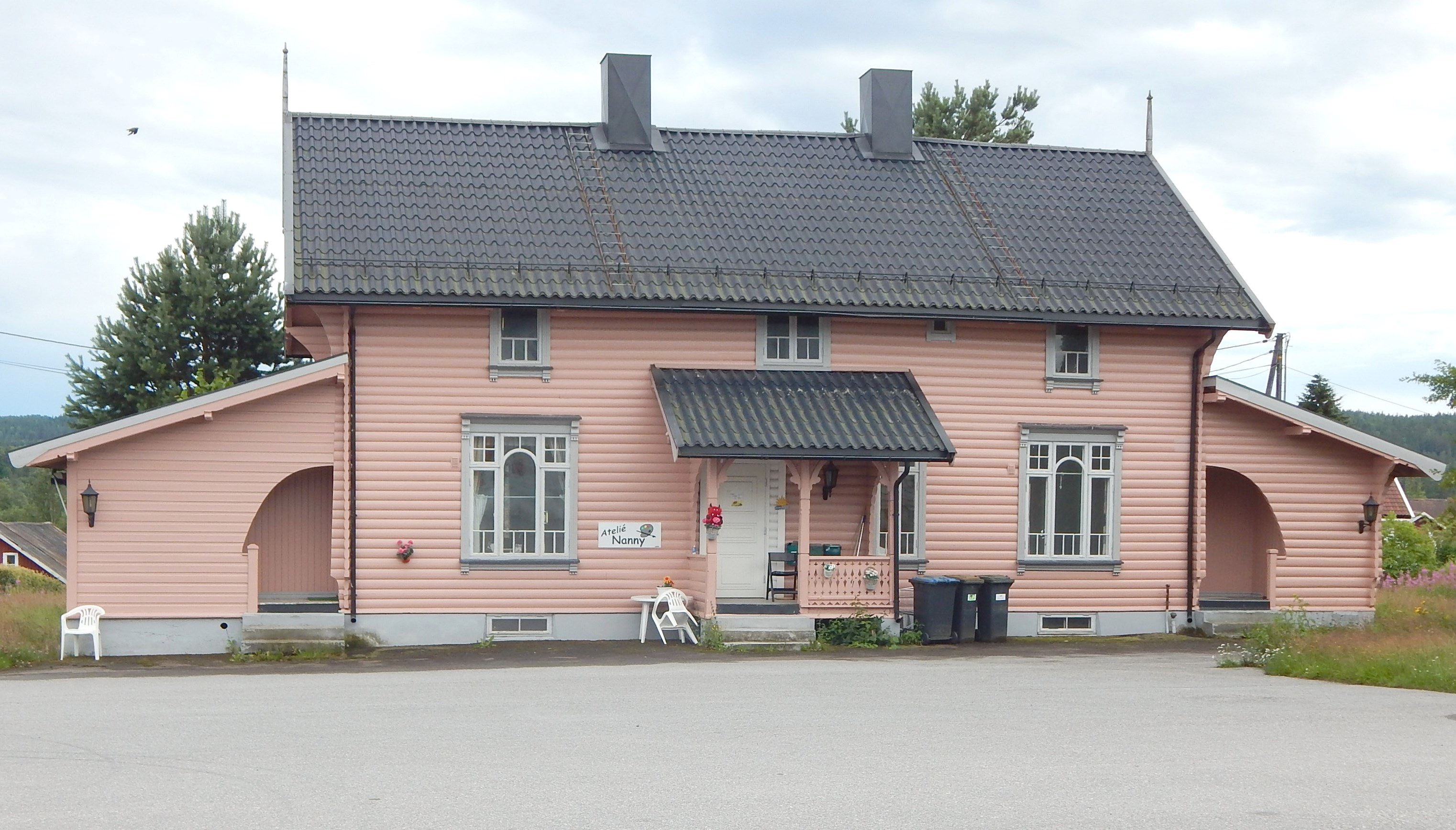 Magelsengården på Skotterud